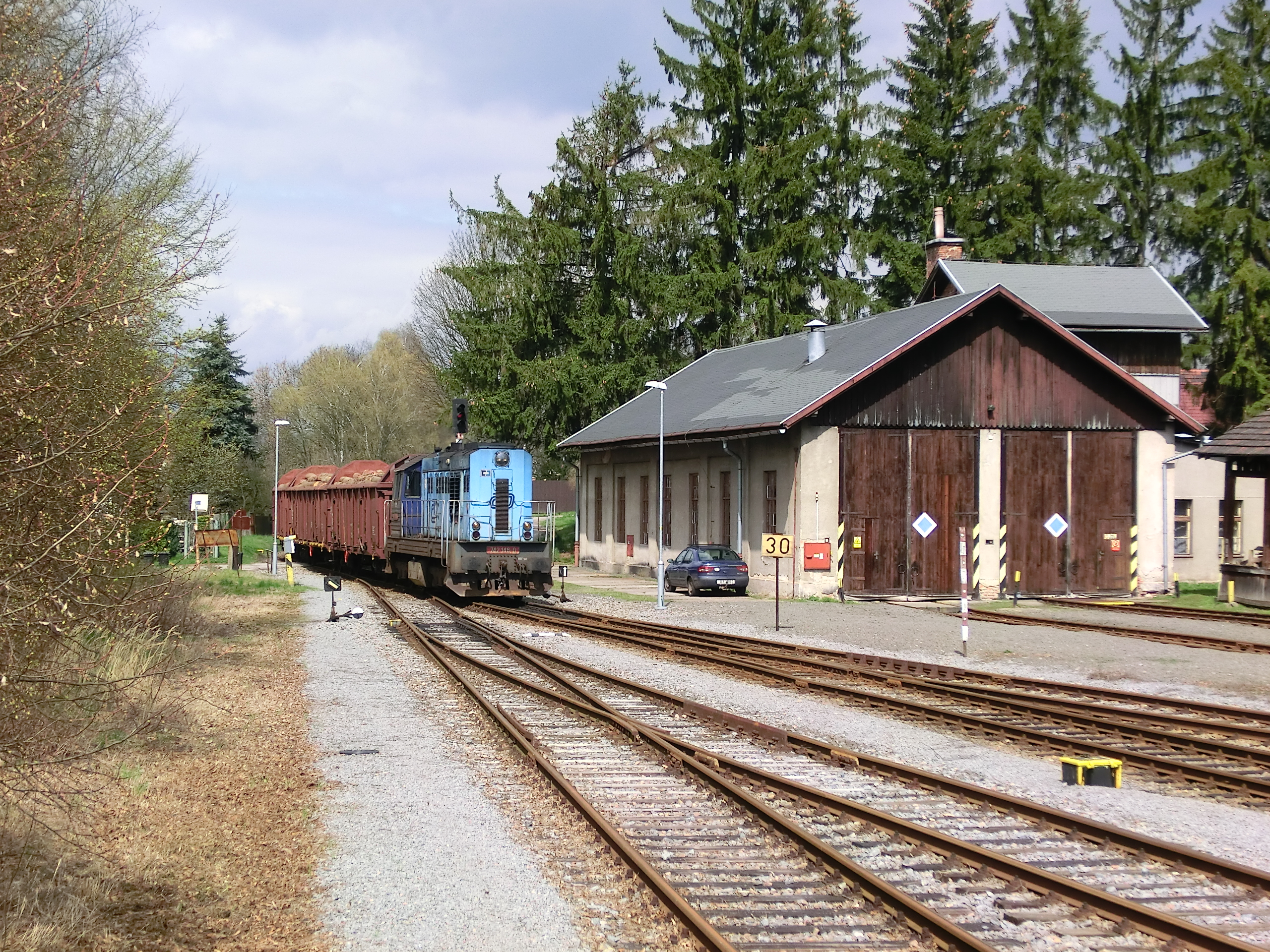 Manipulační vlak z Jablonce nad Jizerou do Martinic, zachycený na nádraží v Jilemnici. Soupravu vede lokotraktor 742.148 (vyroben v ČKD Praha v roce 1979), v Jilemnici se k ní připojoval další vagon s dřevem a čekalo se na předjetí osobním vlakem MOs 15507 v podobě motoráčku 810.652.